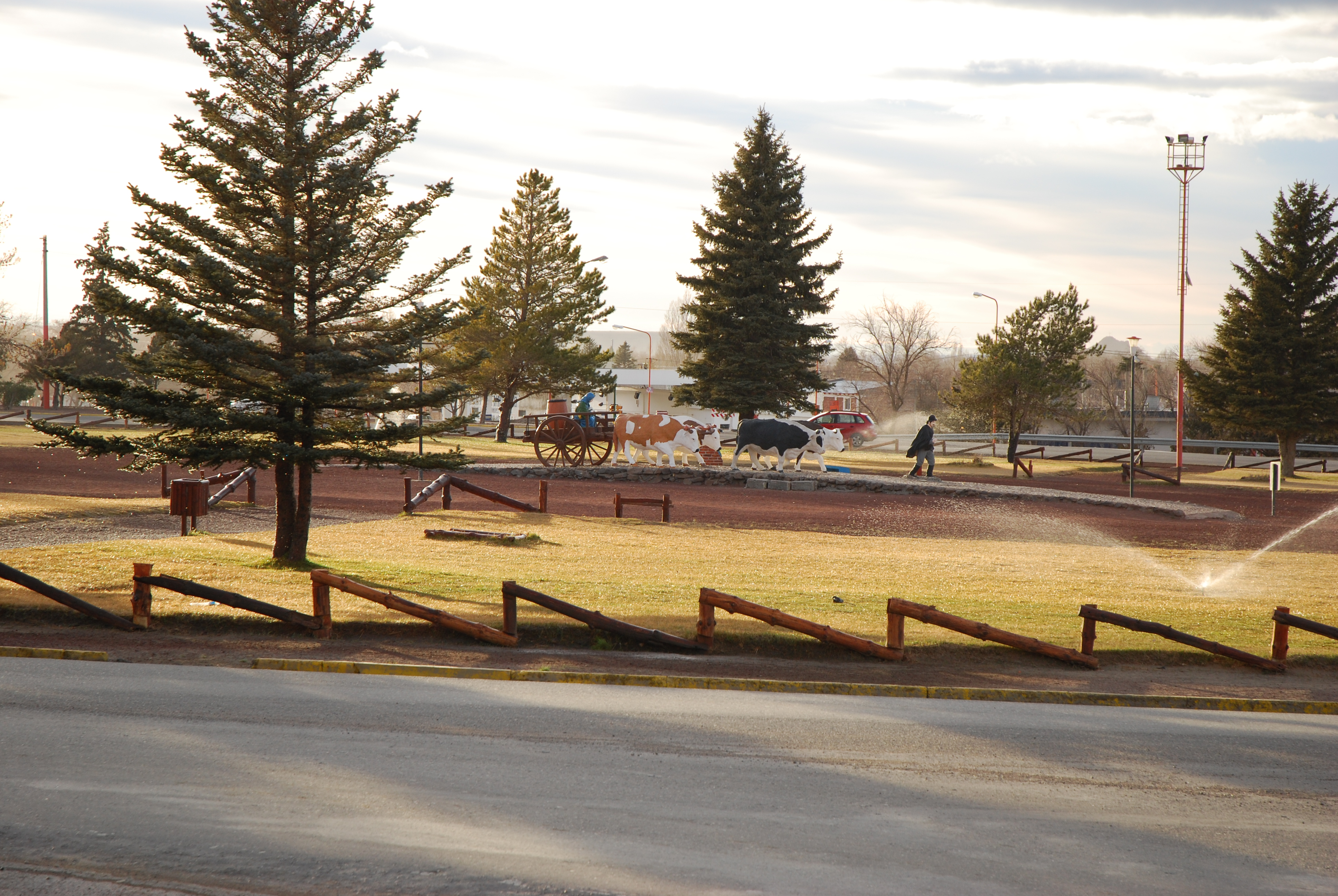 Vista de la rotonda de ingreso a la ciudad, dentro de ella se encuentra el monumento a los primeros pobladores.